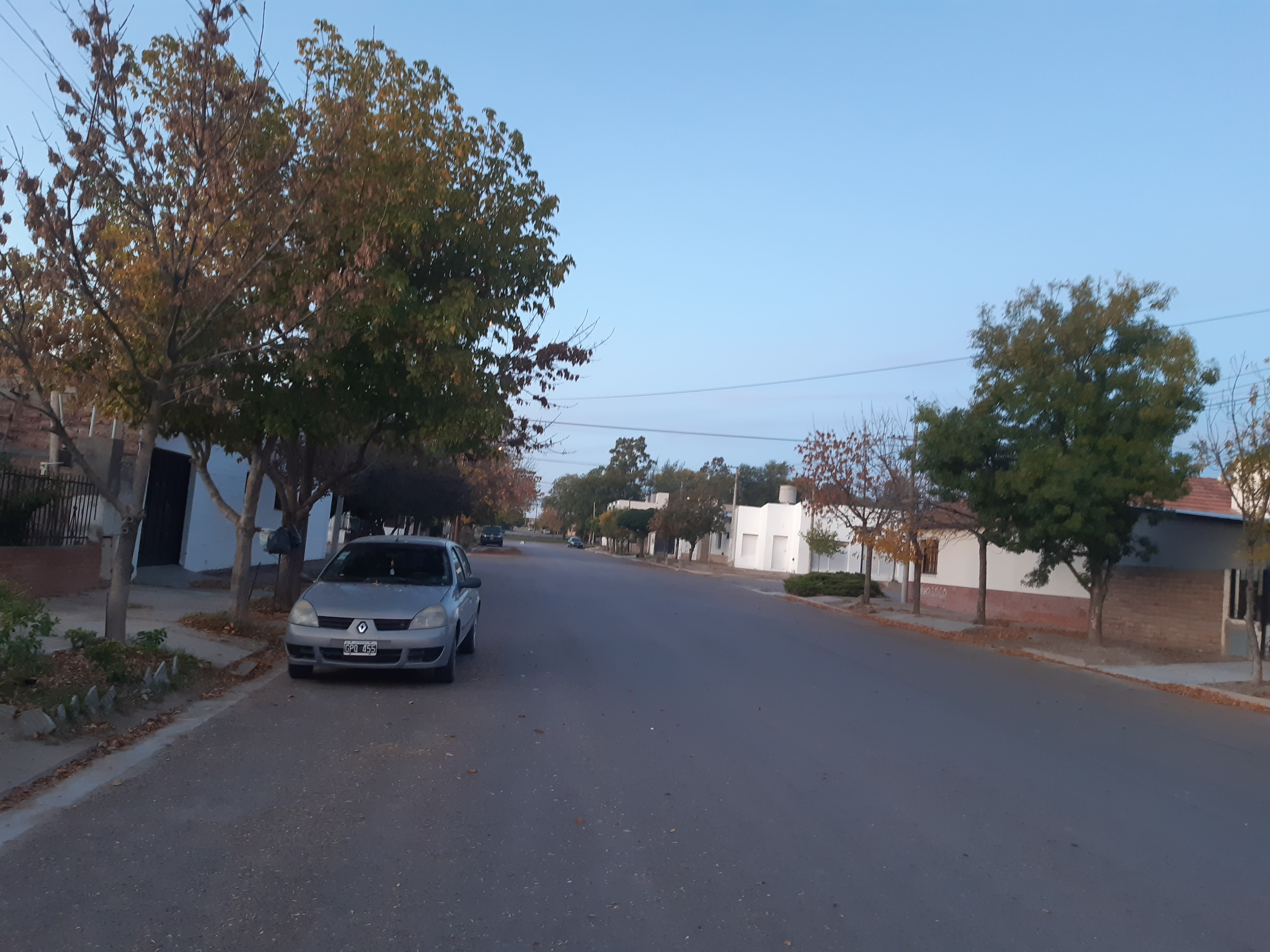 Un atardecer en la calle General Artigas de la localidad de Choele Choel de la provincia de Río Negro en Argentina, durante la cuarentena obligatoria debido a la presencia del covid-19.